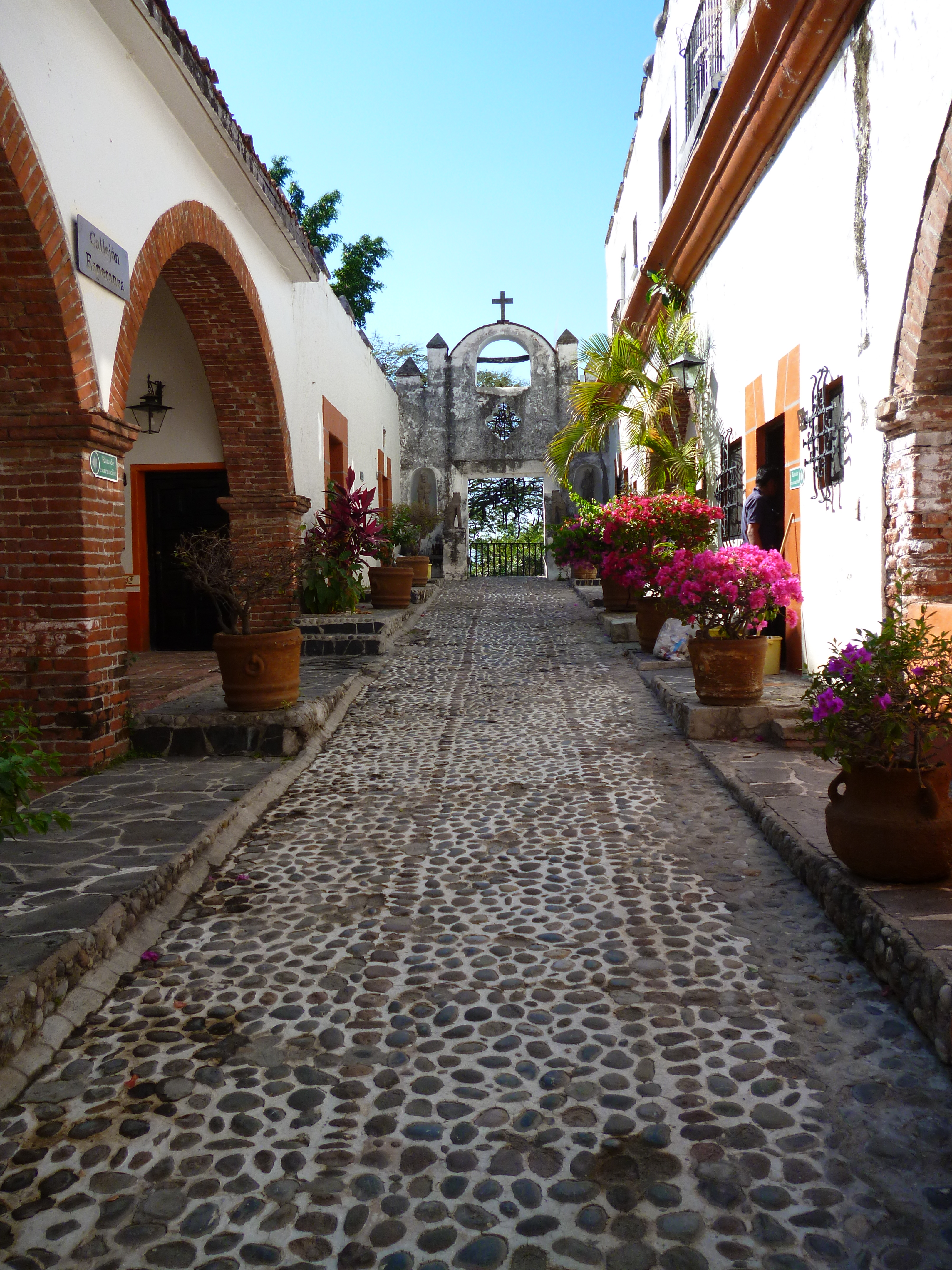 área de cuartos conocida como "Callejón la esperanza" en la Hacienda Vista Hermosa, Tequesquitengo, Morelos. México